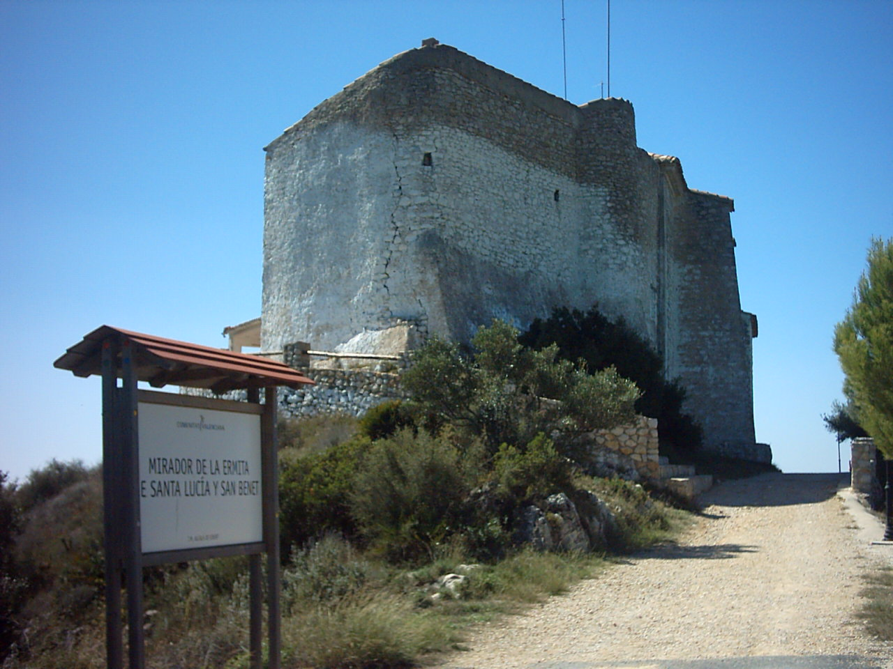 Ermita de Santa Llúcia i Sant Benet (Alcalà de Xivert) 03.004-006.